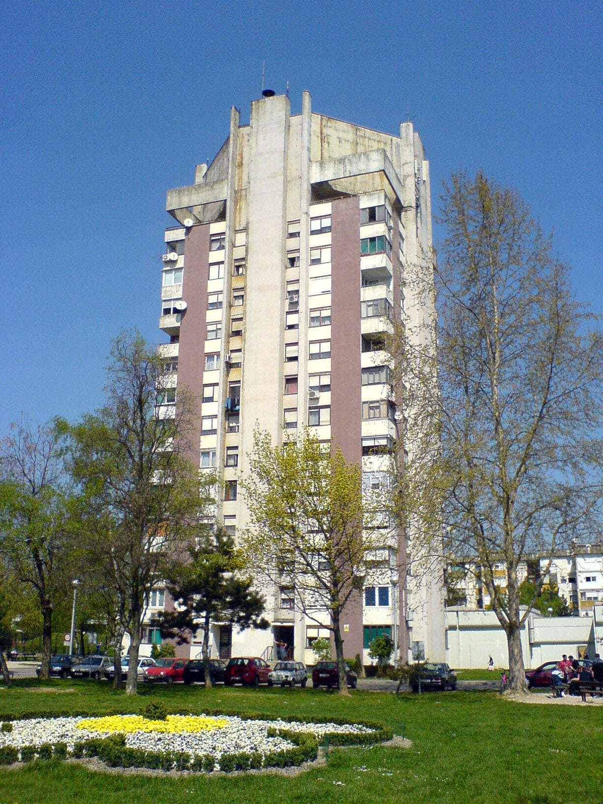 Water tower in Velika Gorica